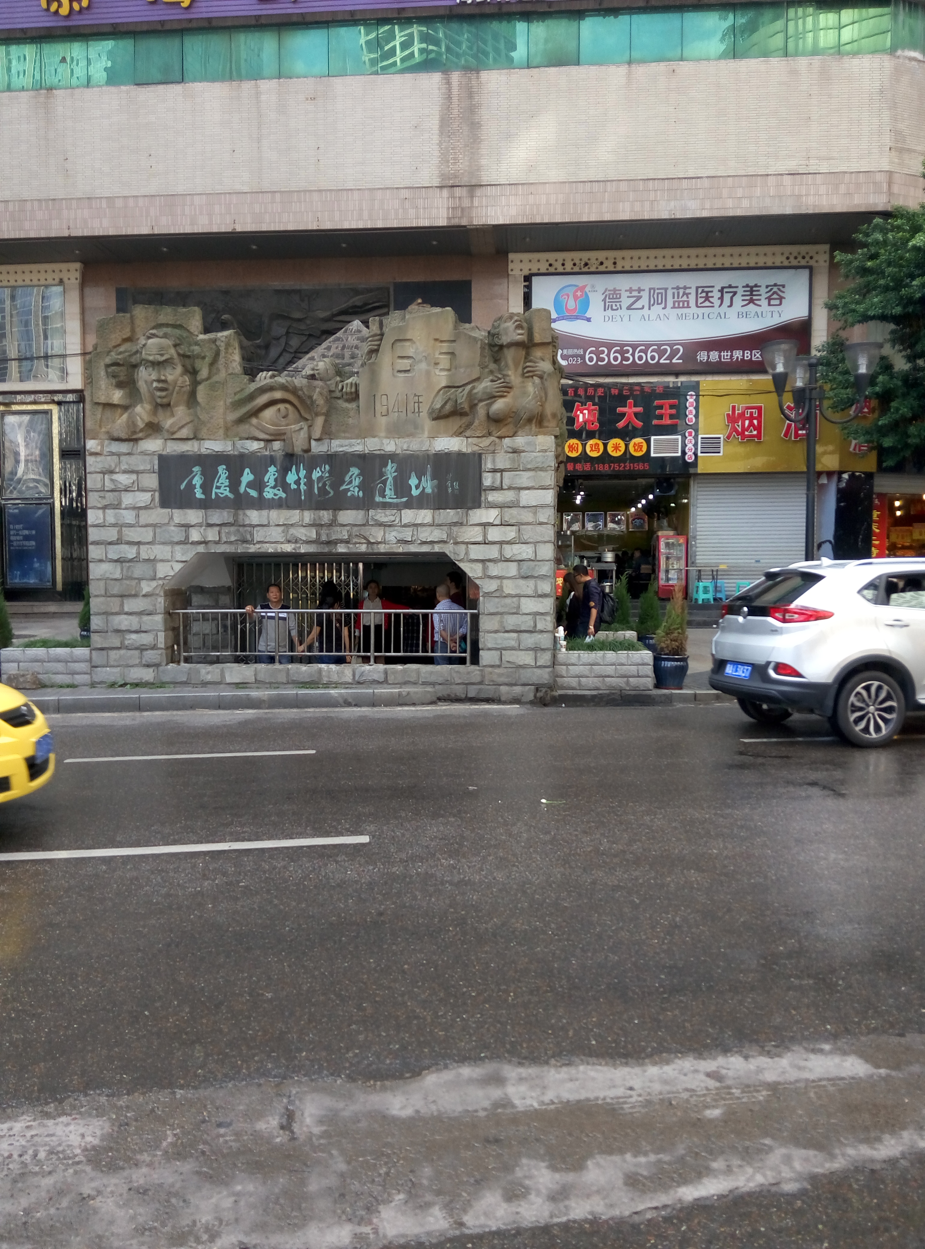 粵語: 重慶大轟炸慘案遺址